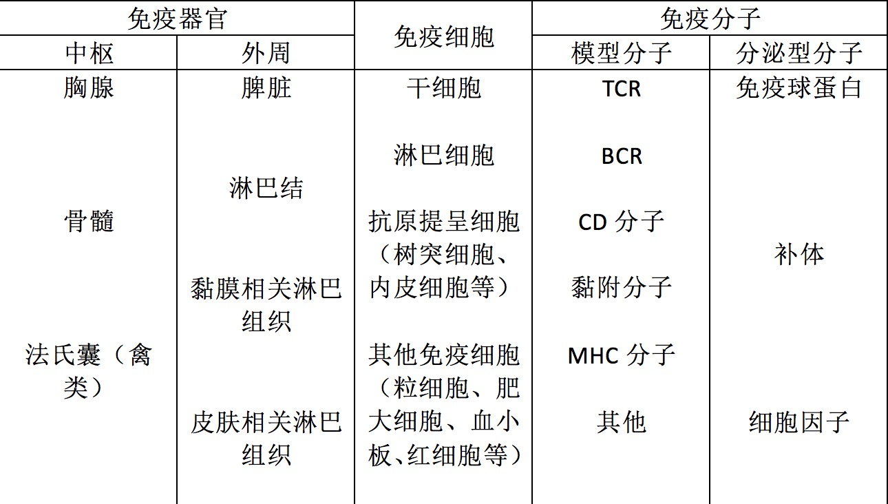 免疫系统组成的缩略图